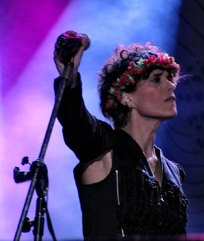 A cantora brasileira Zélia Duncan num espetáculo d'Os Mutantes, 2007.